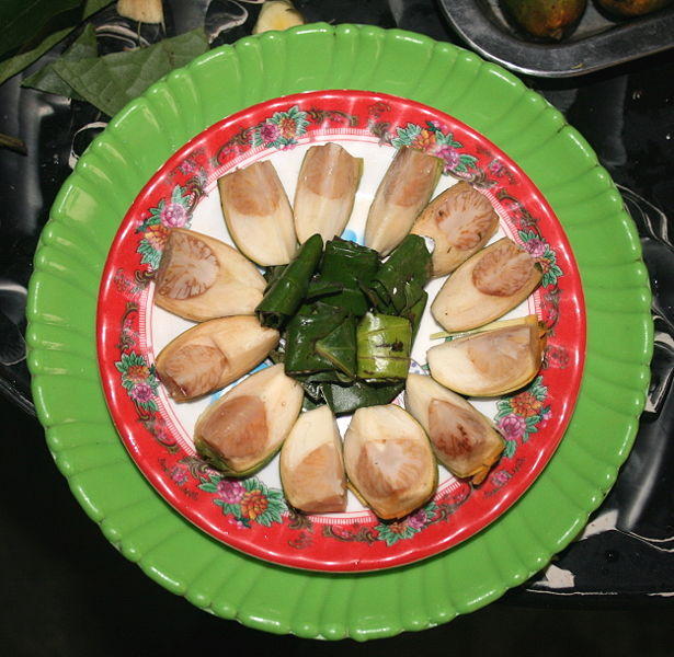 Ảnh do người truyền lên chụp. Mô tả một đĩa cau trầu.